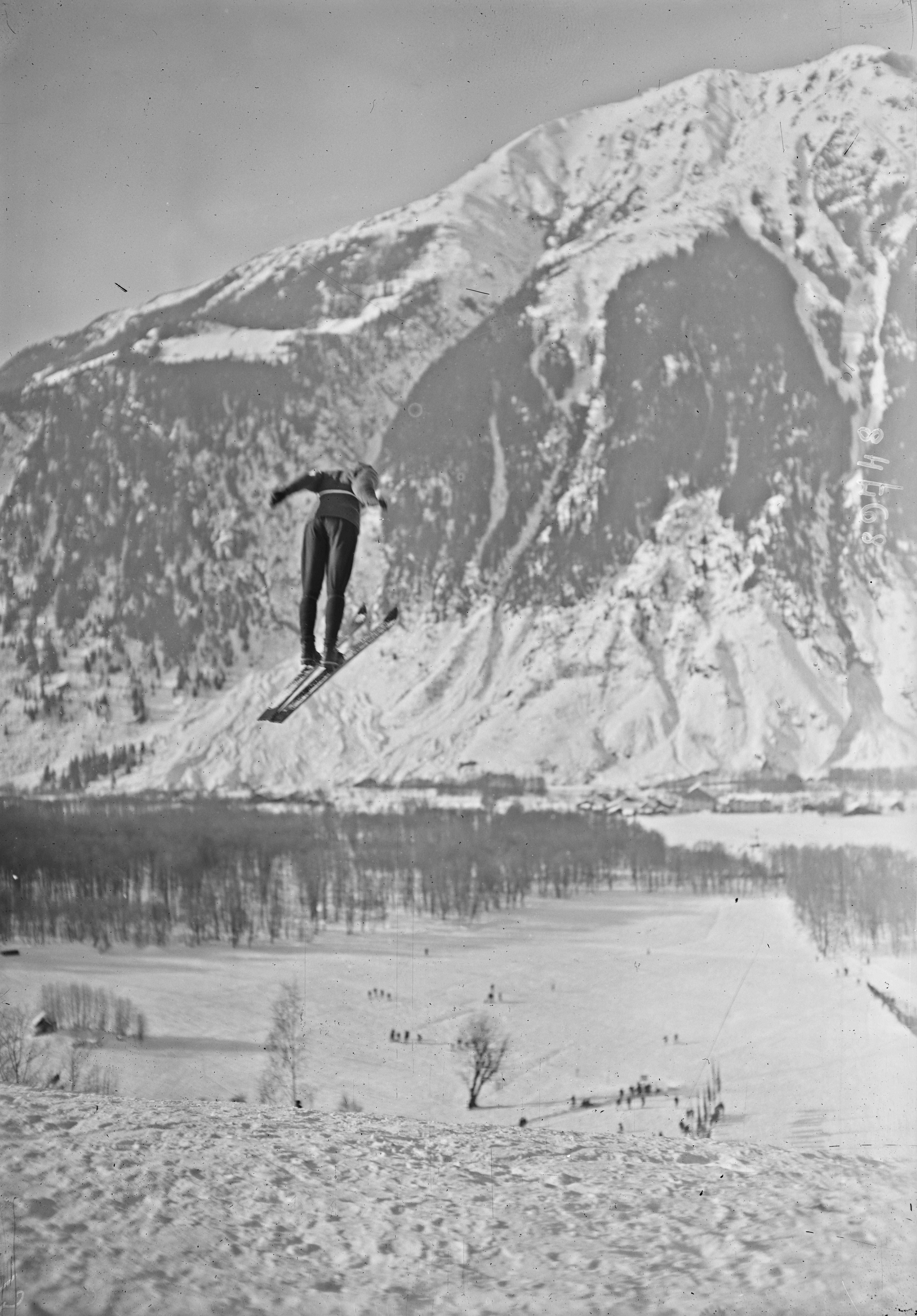 Chamonix, 4/2/24, Nieminen (Finlande) [saut à ski] : [photographie de presse] / [Agence Rol]